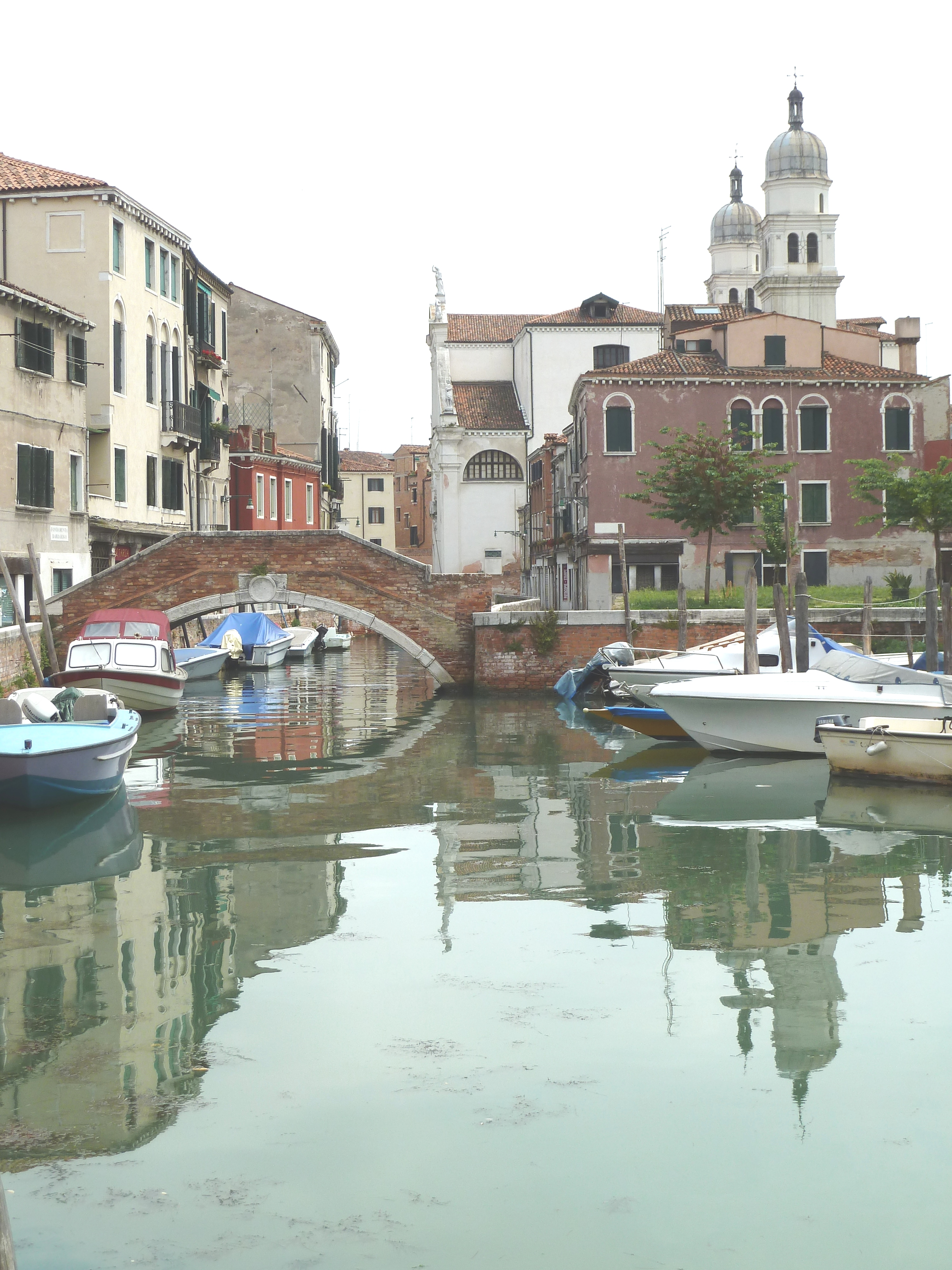 Ponte de la Piova (Venice)